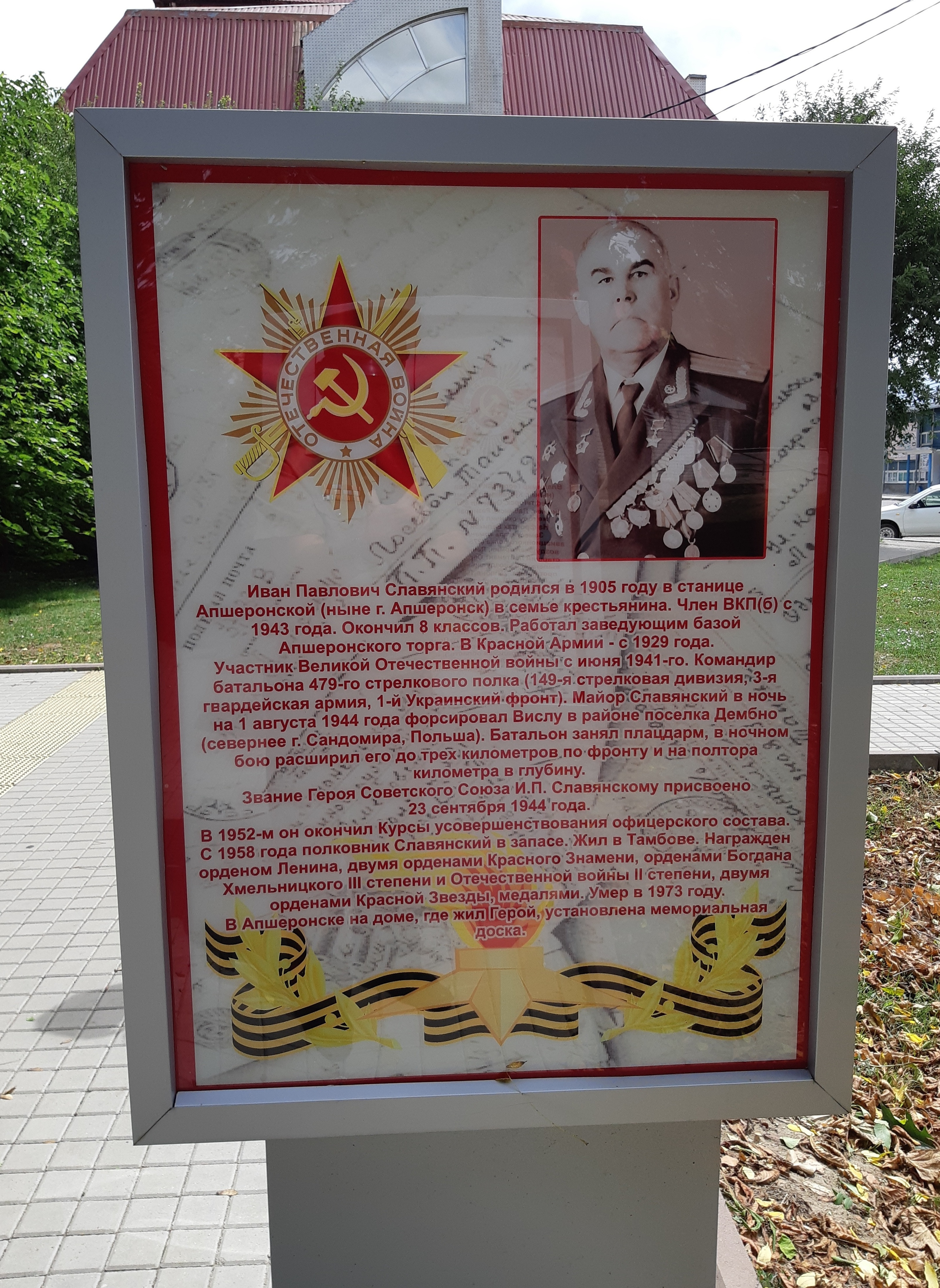 Славянский Иван Павлович грой Советского Союза